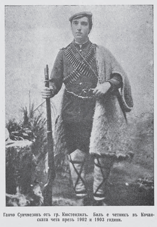 Gancho Suichmezov from Kyustendil